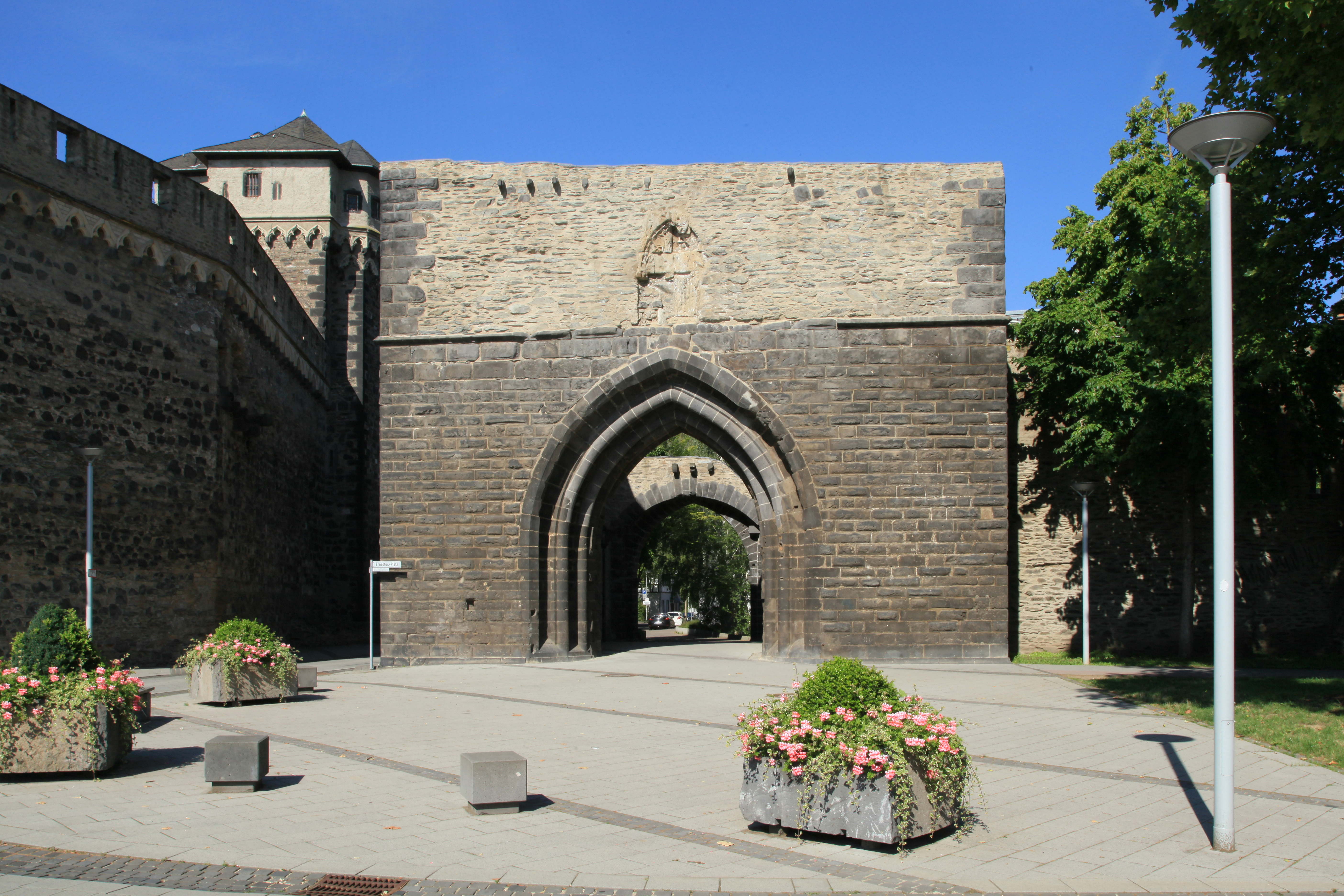 Hochstraße zwischen Stadtburg und Koblenzer Tor am Ernestus-Platz in Andernach